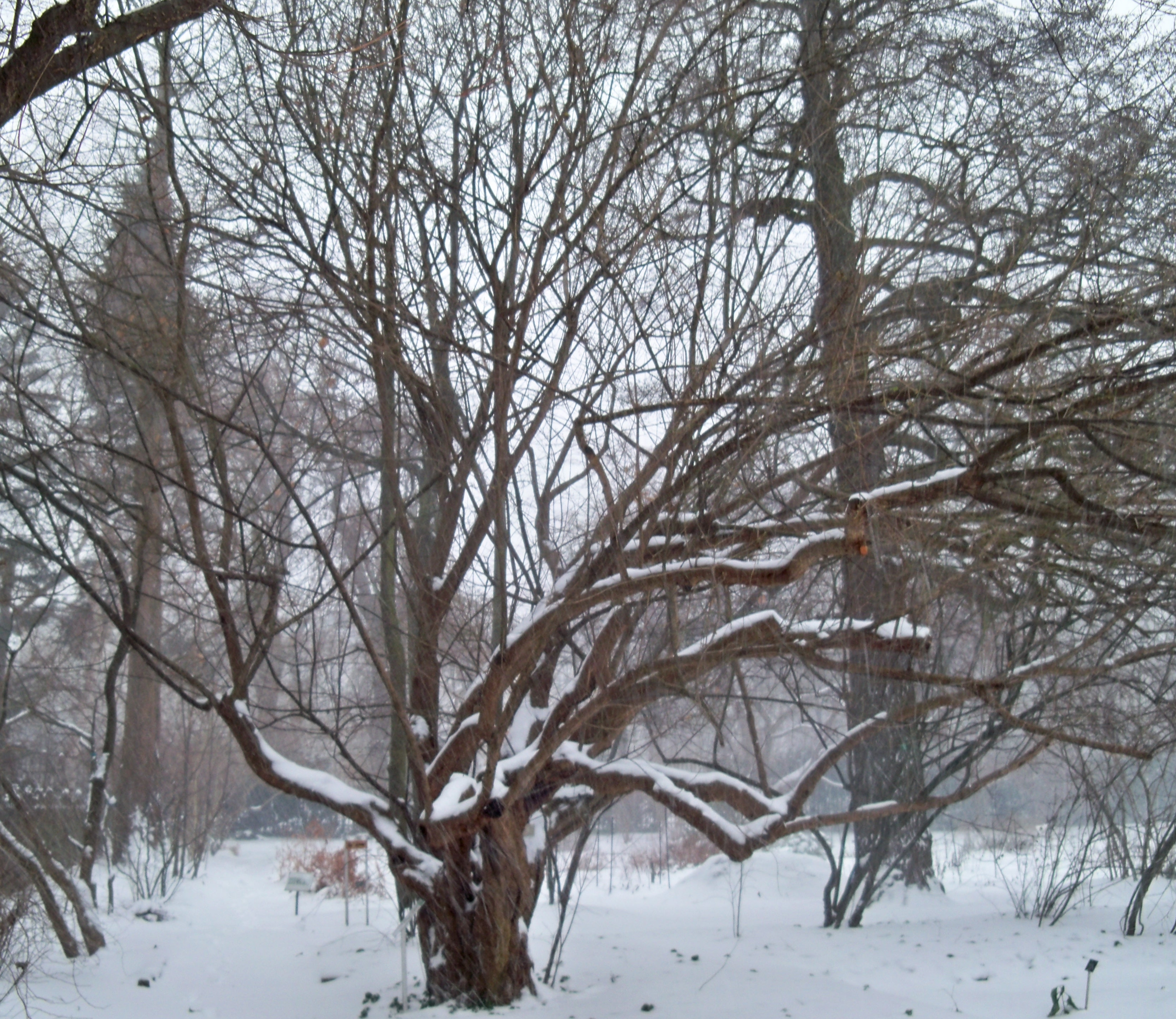 Pomnikowy dereń w Ogrodzie Botanicznym Uniwersytetu Warszawskiego.